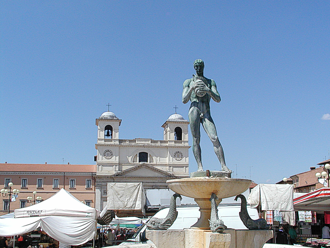 L'Aquila, la piazza del Duomo con in primo piano la "Fontana Vecchia" di Nicola D'Antino (1880-1966) e sullo sfondo la Cattedrale di San Massimo.